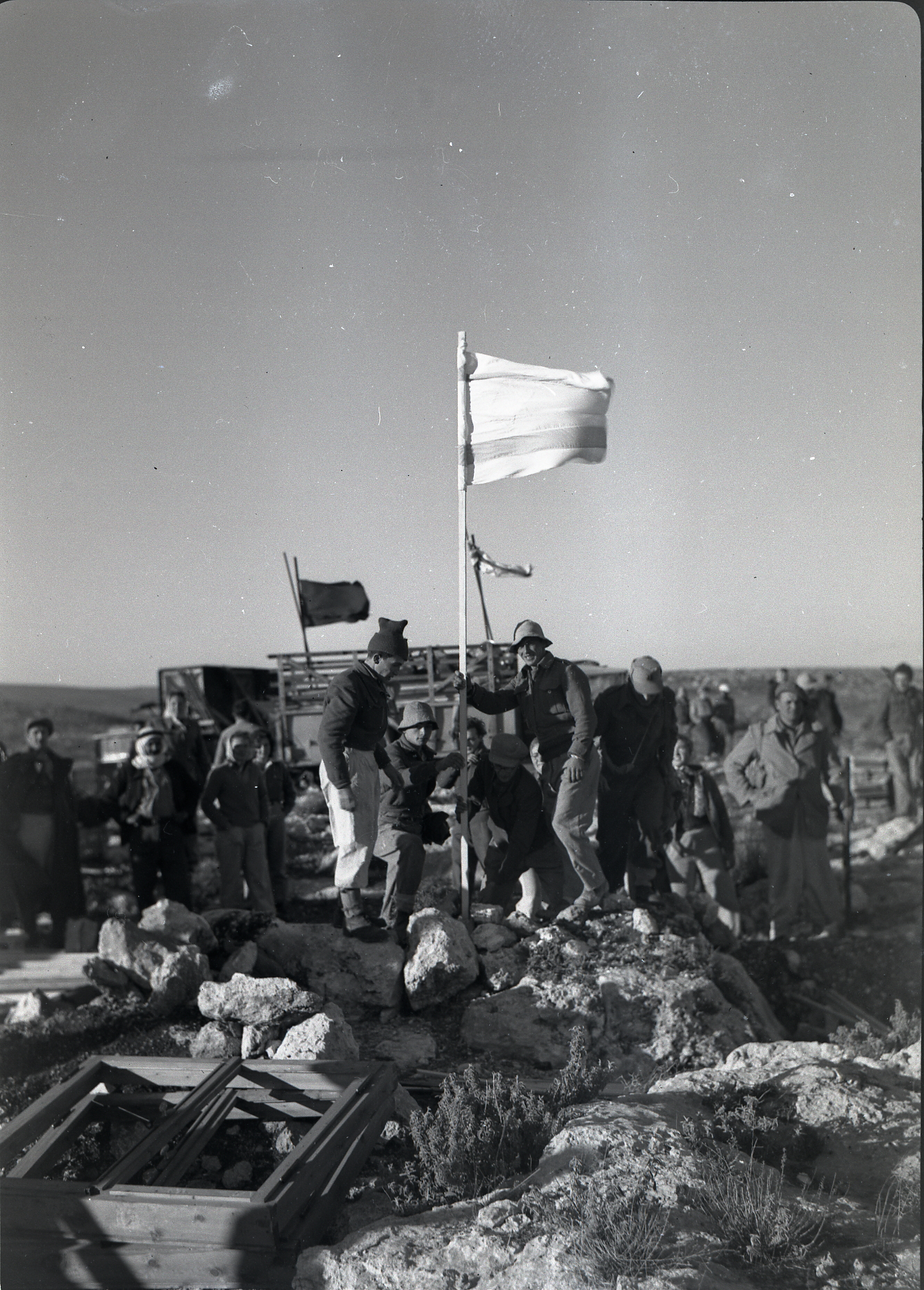 עליה לקיבוץ יסעור צלם בנו רותנברג 1949 גנזך המדינה